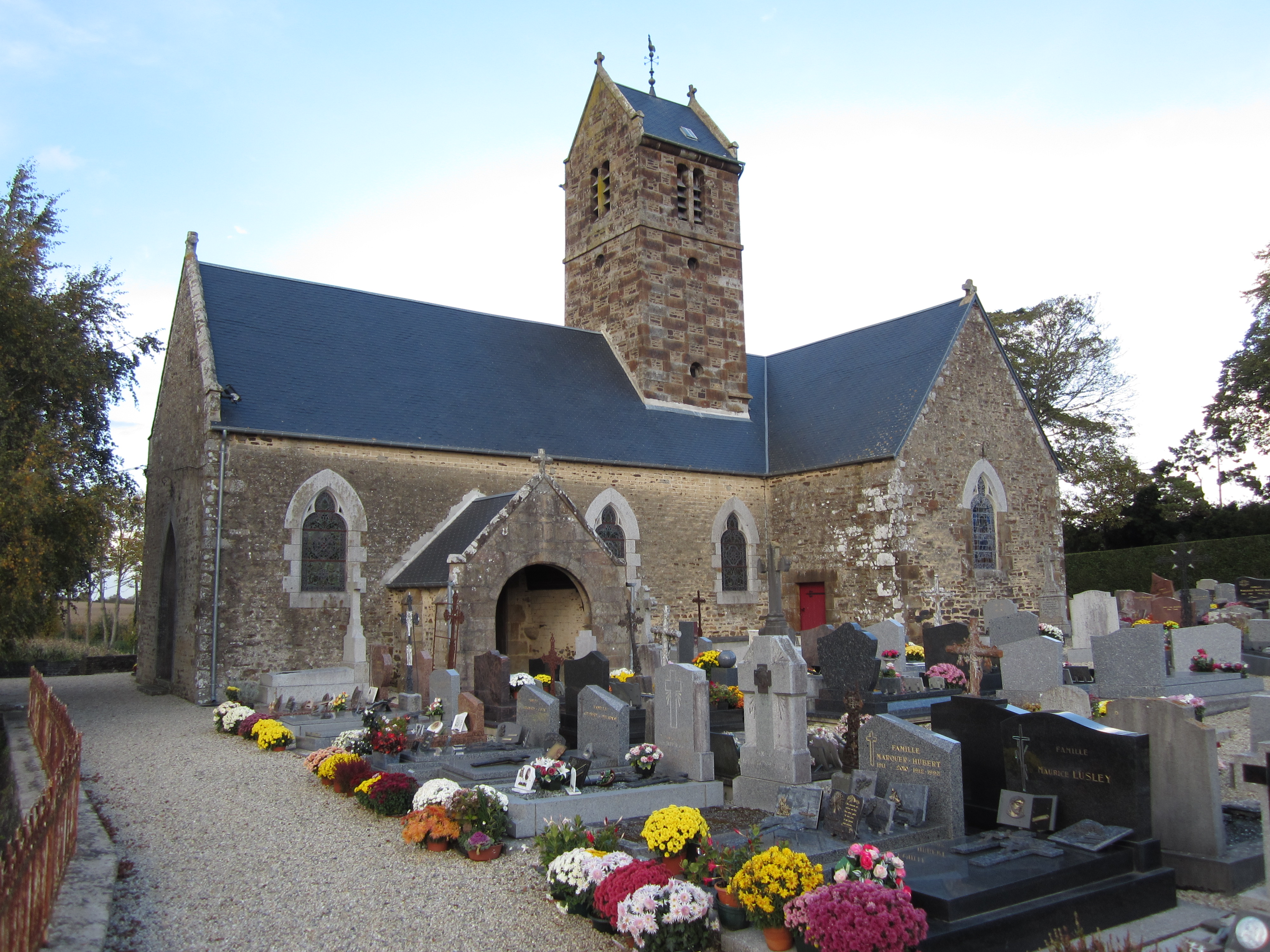 église de Saint-Senier-de-Beuvron